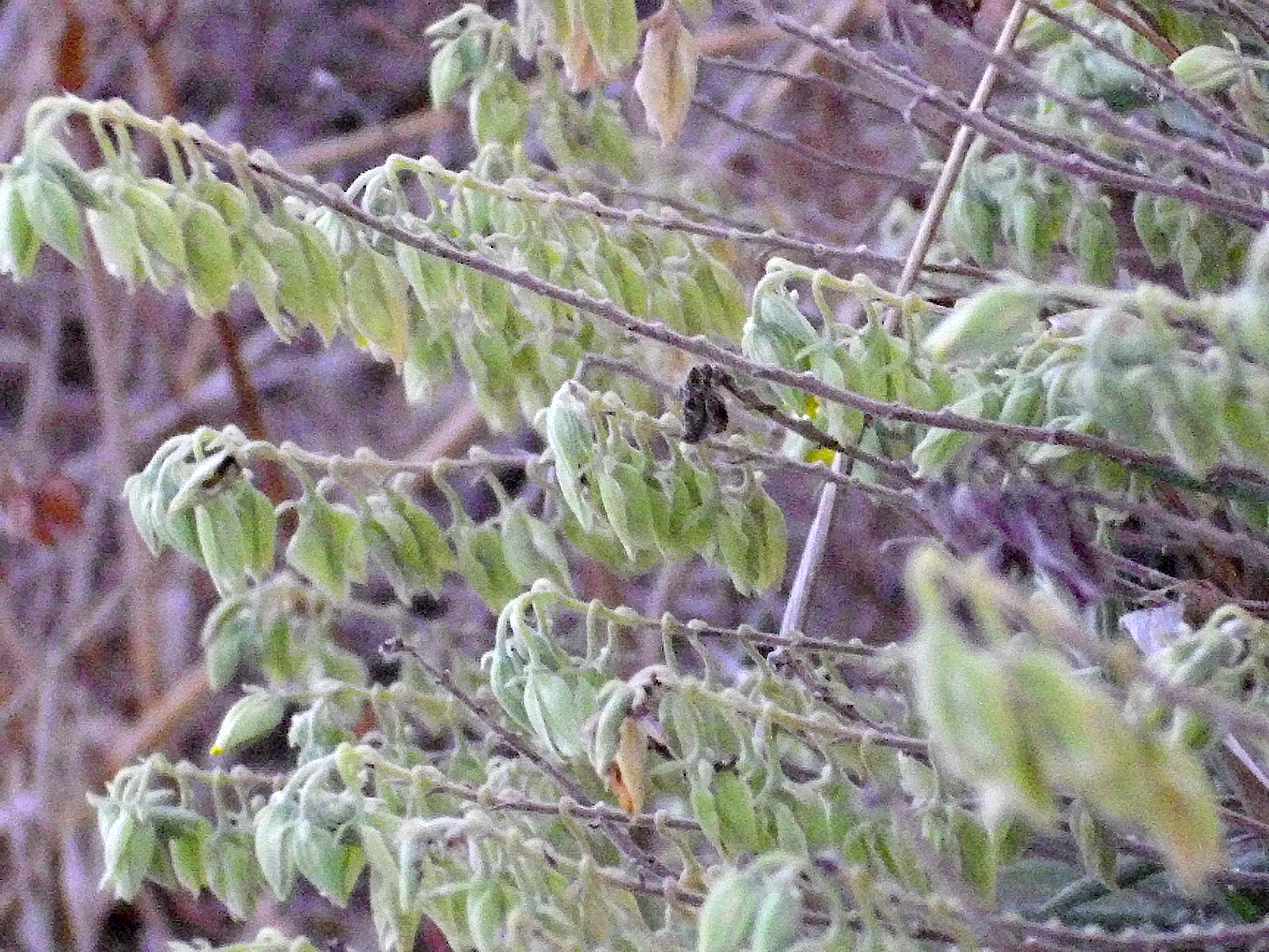 Halimium atriplicifolium habitus, La Mata, Torrevieja, Alicante, Spain